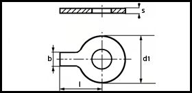 DIN 93